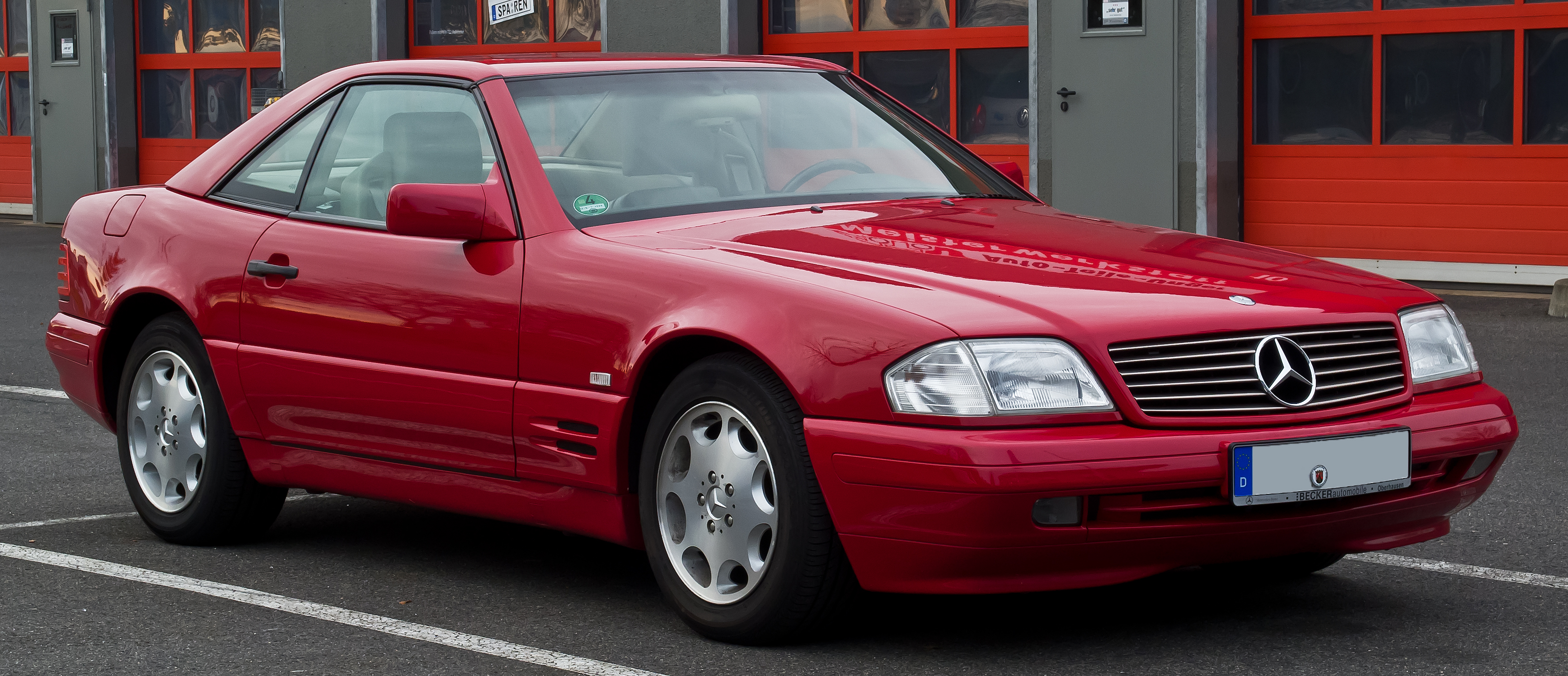 Mercedes-Benz SL 320 (R 129, 1. Facelift)